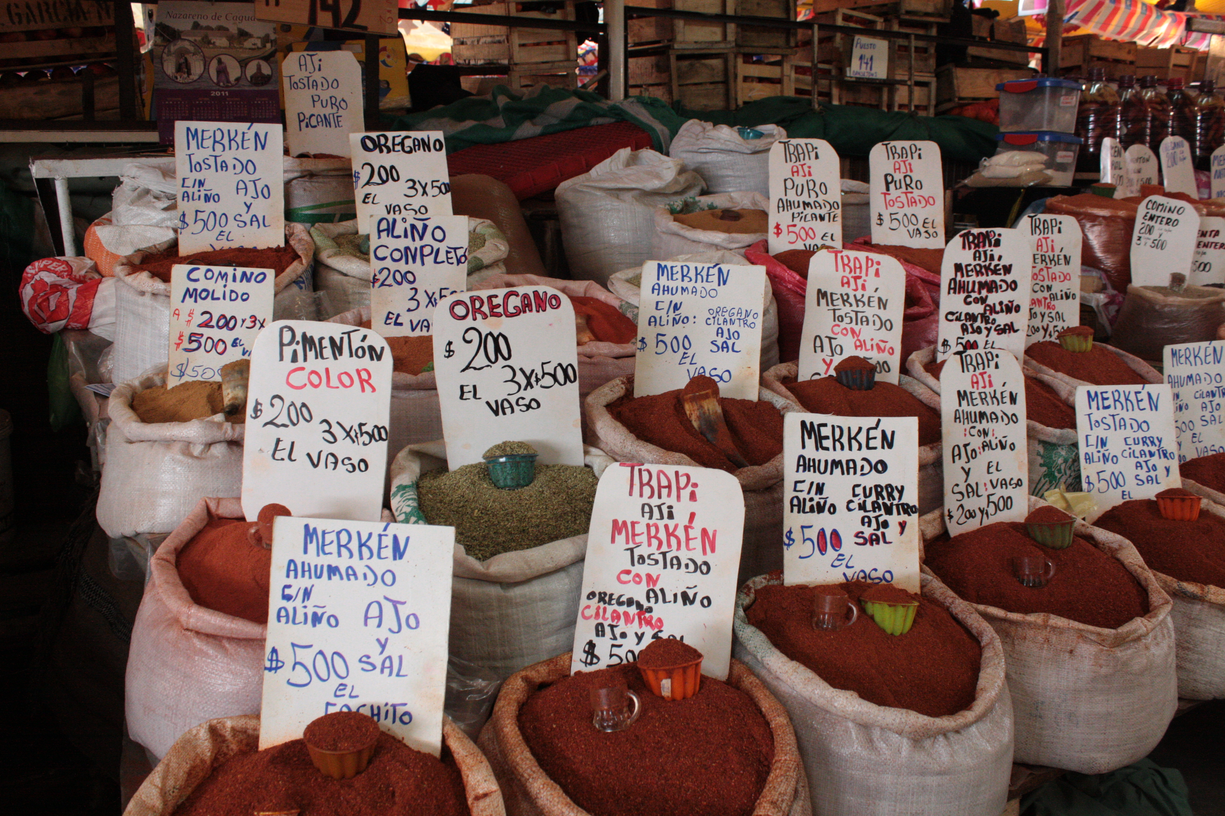 Varios locales de especias se ubican en la Feria Pinto de Temuco.